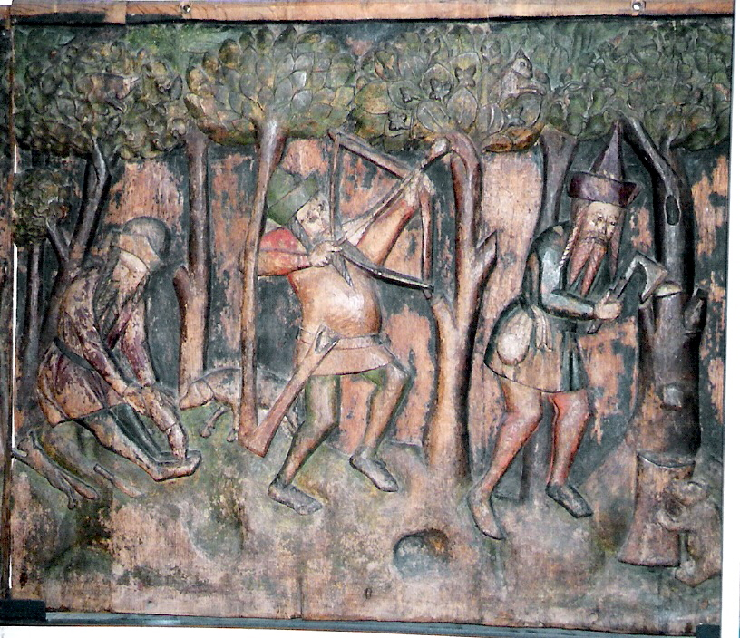 Stralsund /Germany), Nikolaikirche, Russlandfahrergestühl, Tafel (A) B (CD) Fotograf: Klugschnacker, 2006-07-xx